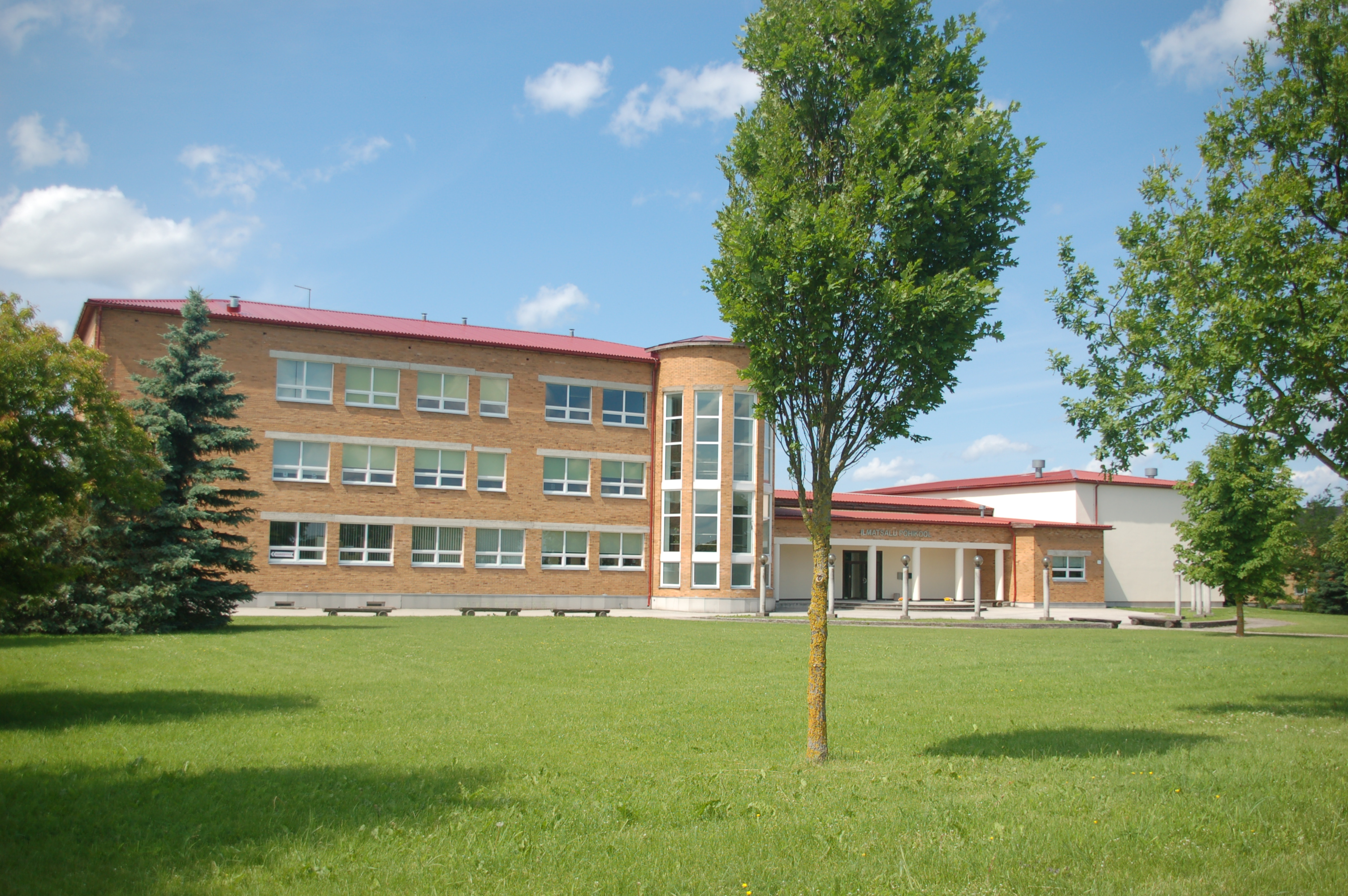 Ilmatsalu Põhikool, kus asub Ilmatsalu raamatukogu (2015)